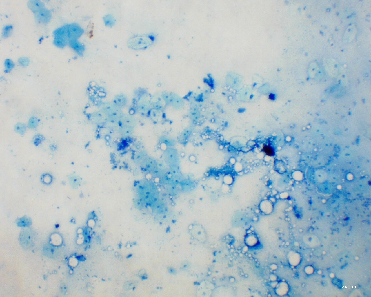 Gruppe von in Menthylenblau gefärbten Mundschleimhautzellen